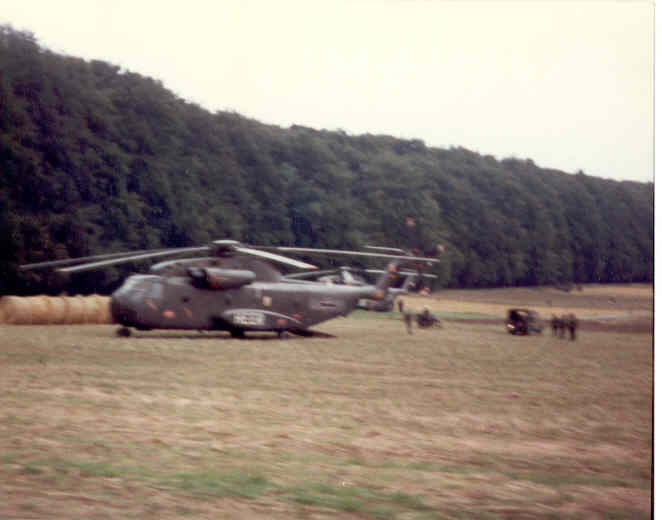 Description : hélicoptères militaires CH-53 Stallion Source : photo prise par utilisateur:Fistos